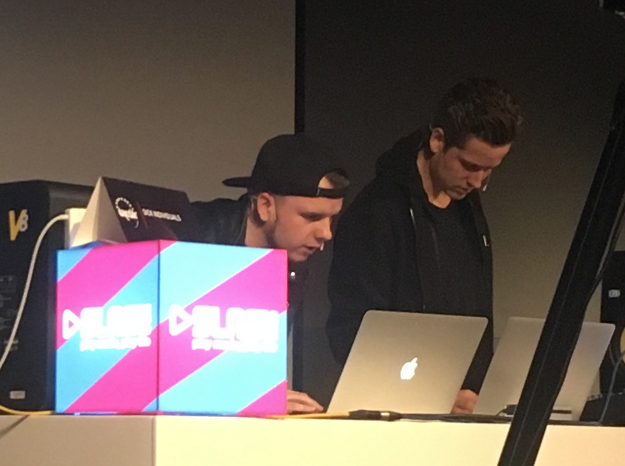 Cropped Version of Image: Les Sick Individuals présentent leurs morceaux à Dancefair 2018.jpg Les Sick Individuals présentent leurs morceaux à Dancefair 2018.